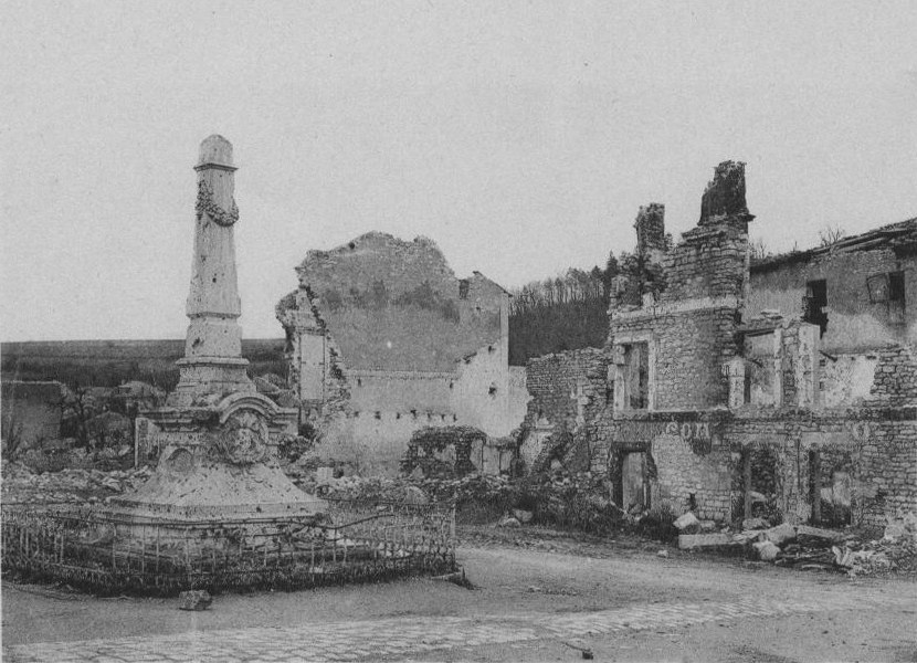 Place et monument de 1870 à St-Mihiel fin septembre 1918 après le reprise du Saillant de St-Mihile.